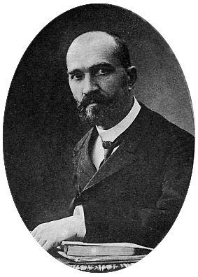 Пётр Герасимович Устинов (15 (27) декабря 1862, Пермская губерния — после 1917) — земледелец, член уездной земской управы, депутат III Государственной Думы от Пермской губернии (1907—1912).